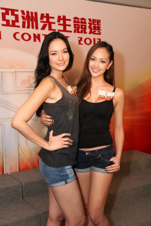 гонконгские топ-модели Ana R. и Jessica C.